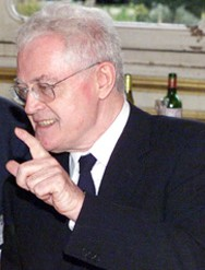 Lionel Jospin en octobre 2000, au cours d'une rencontre avec Vladimir Poutine.